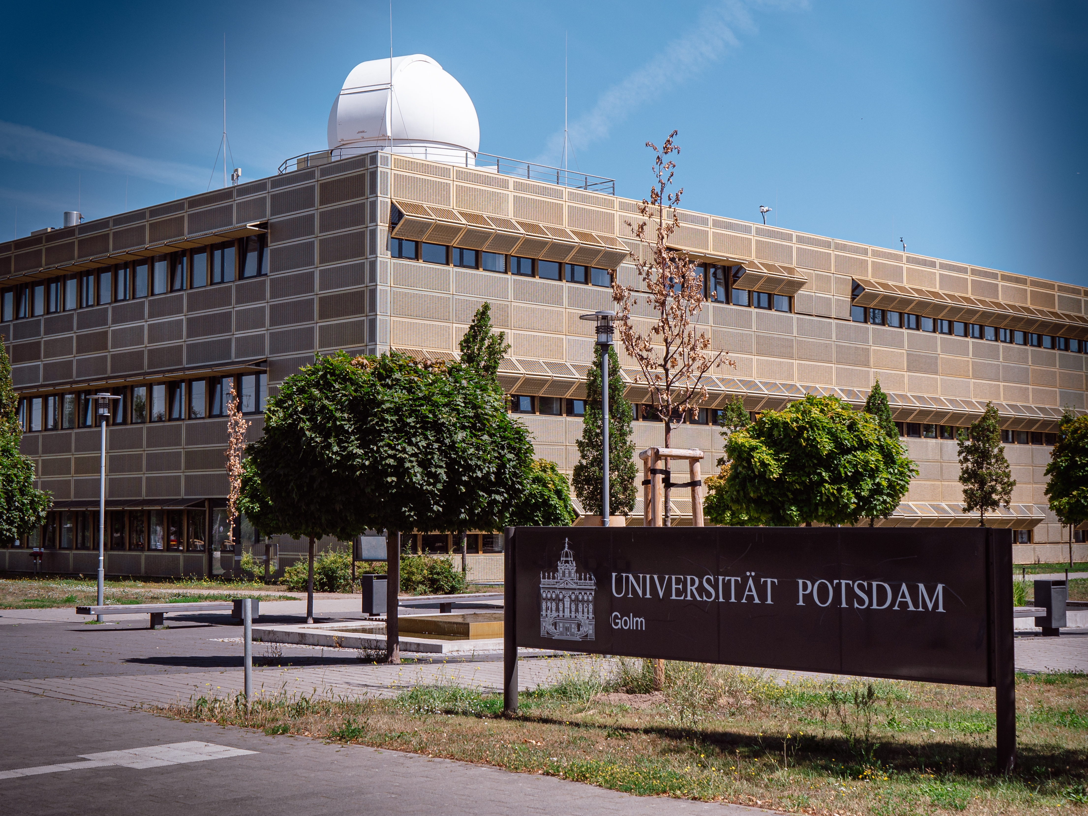 Universität Potsdam, Institut für Physik und Astronomie